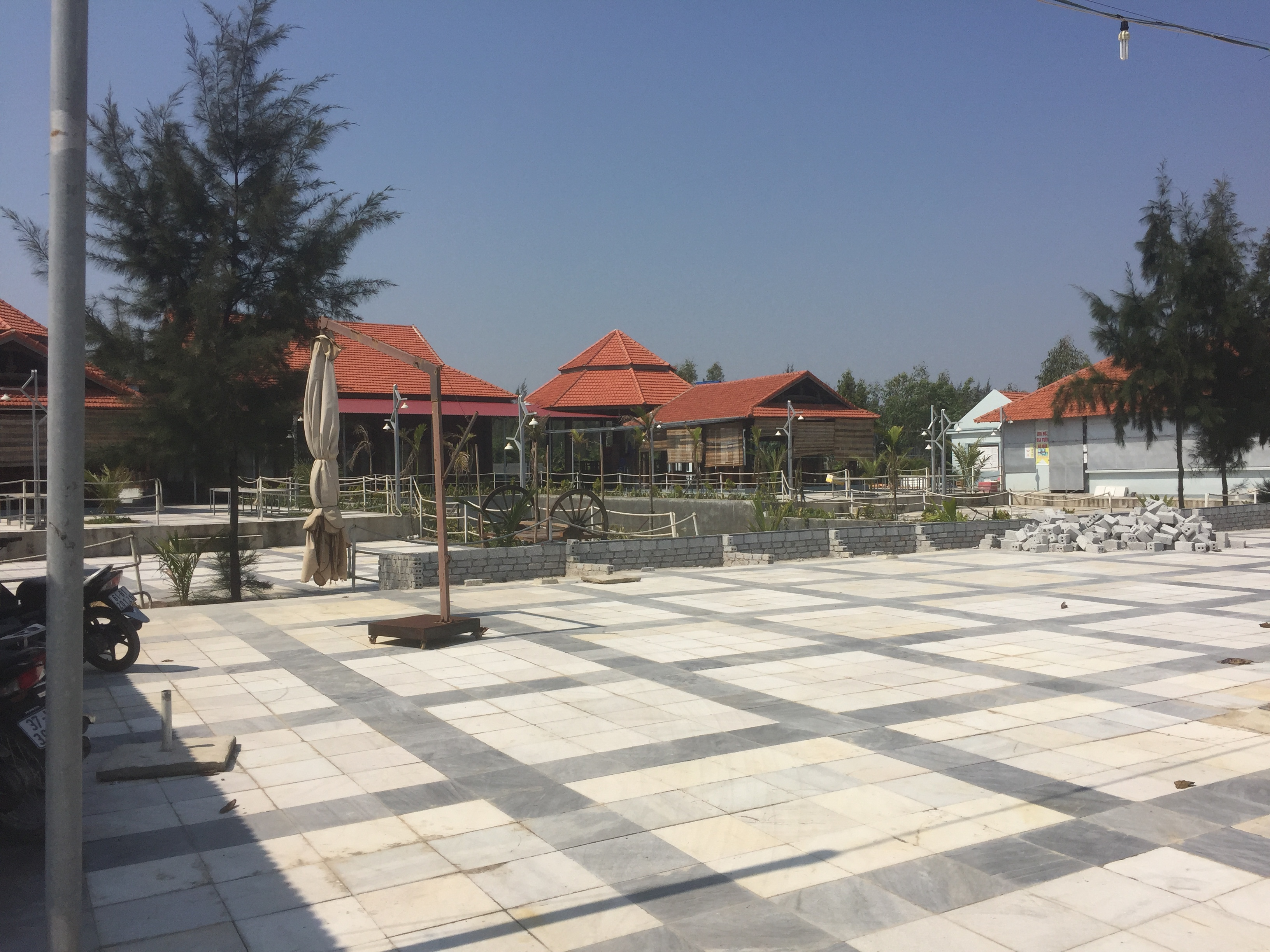 Khu du lịch sinh thái Rubi star Quynh resort